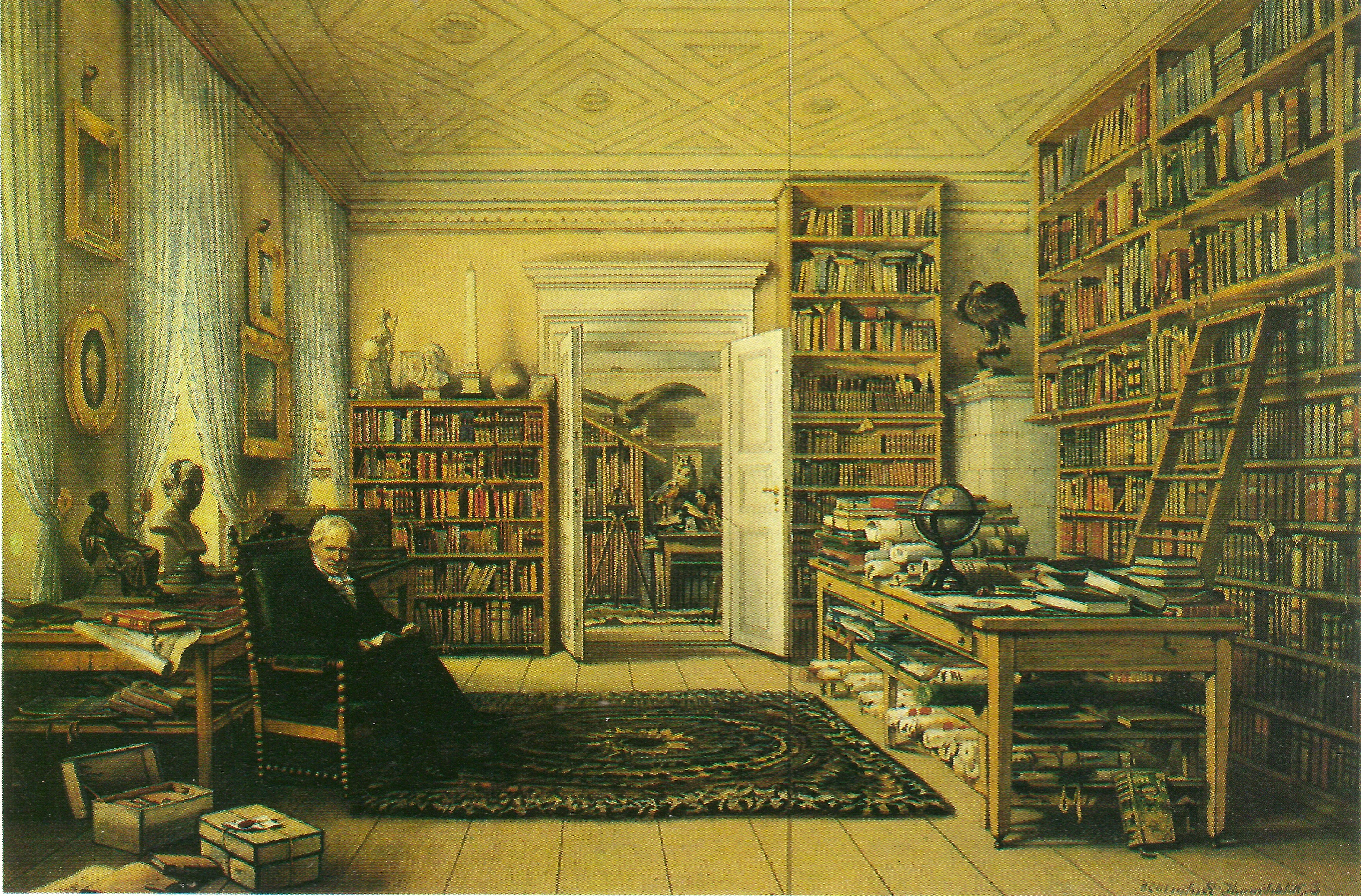 Arbeitszimmer des Alexander von Humboldt in Berlin, Oranienburger Str. 67